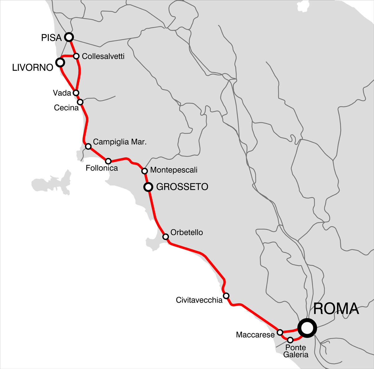 Mappa della ferrovia Tirrenica.